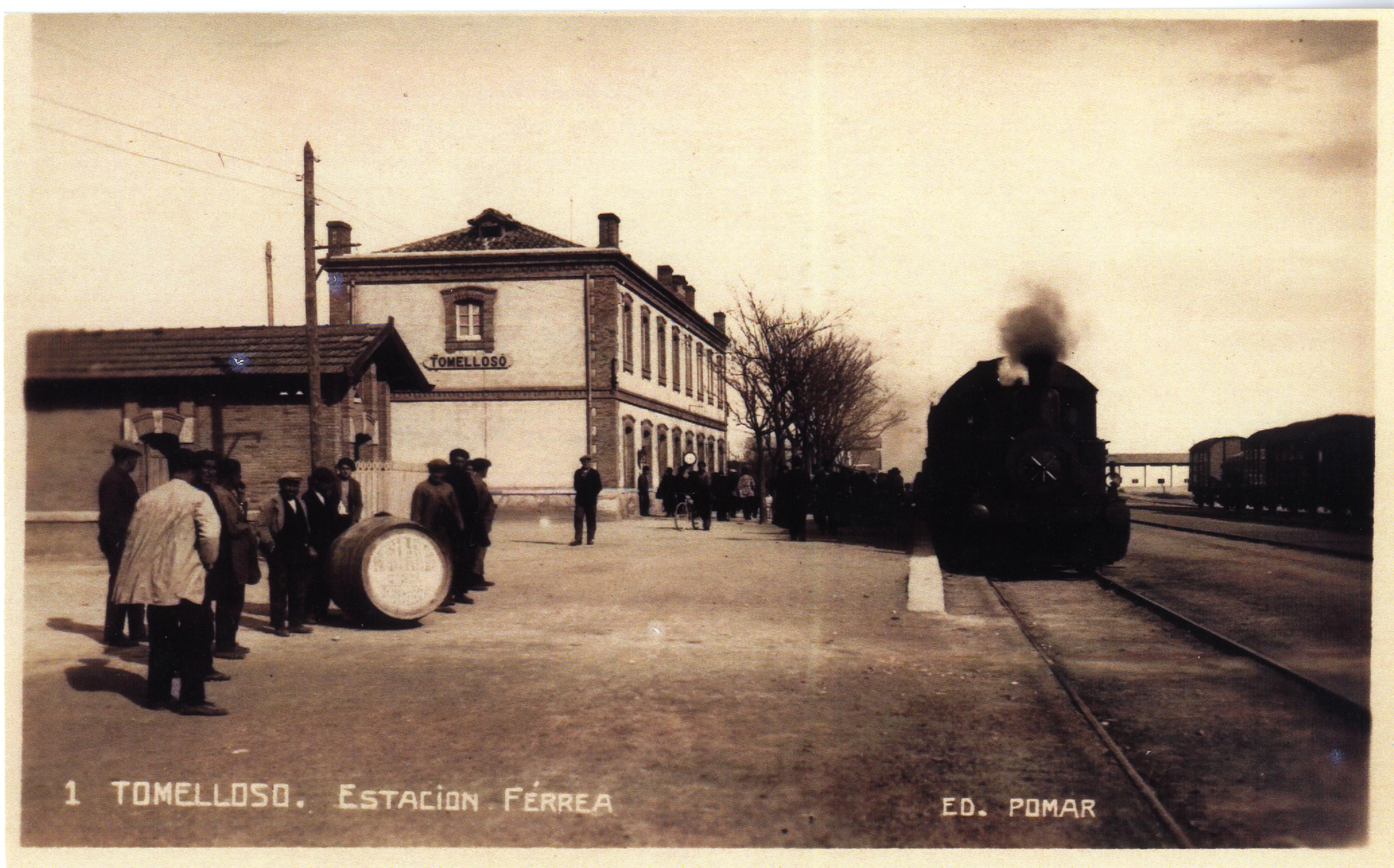 Instantánea de la estación de ferrocarril de Tomelloso, a principios de los años 30 del siglo XX, con la locomotora a punto de partir. A la izquierda de la imagen se puede ver a un grupo de personas junto a lo que parece ser un tonel utilizado en los transportes de mercancías de productos vínicos.